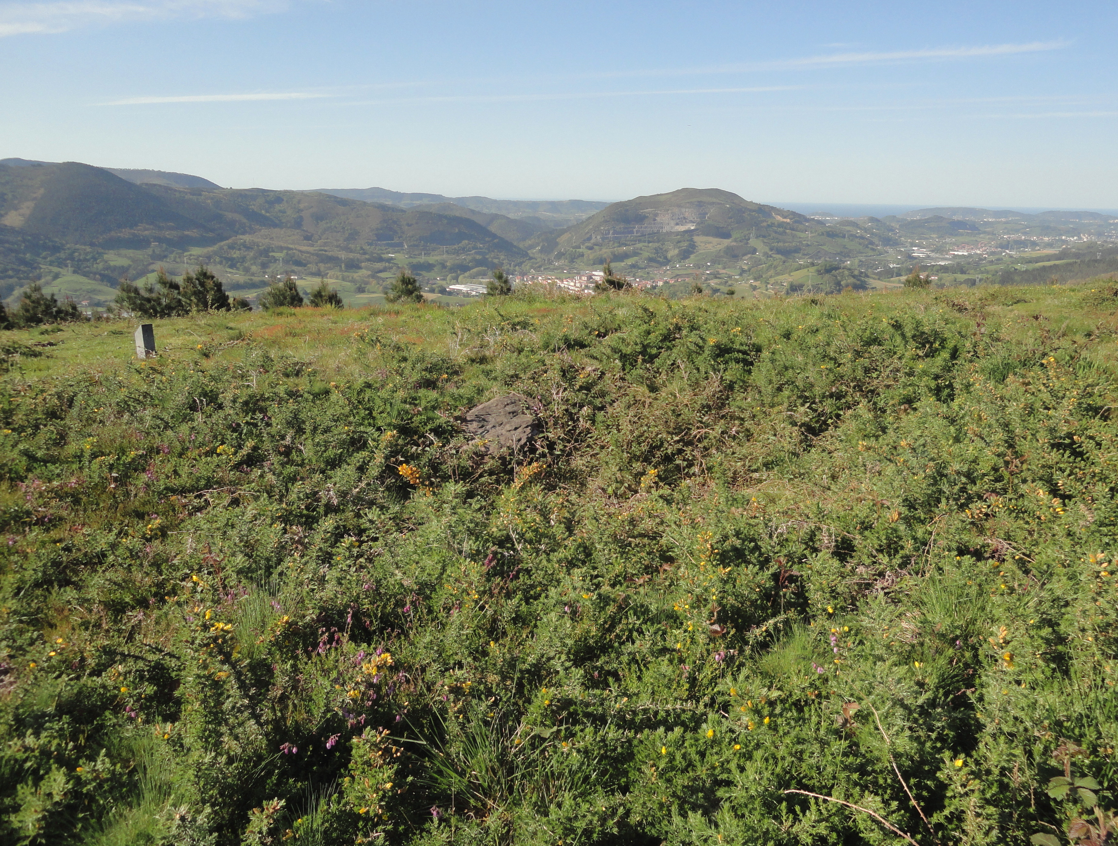 Oindolar I trikuharria